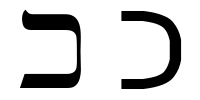 hebrew letter kaf